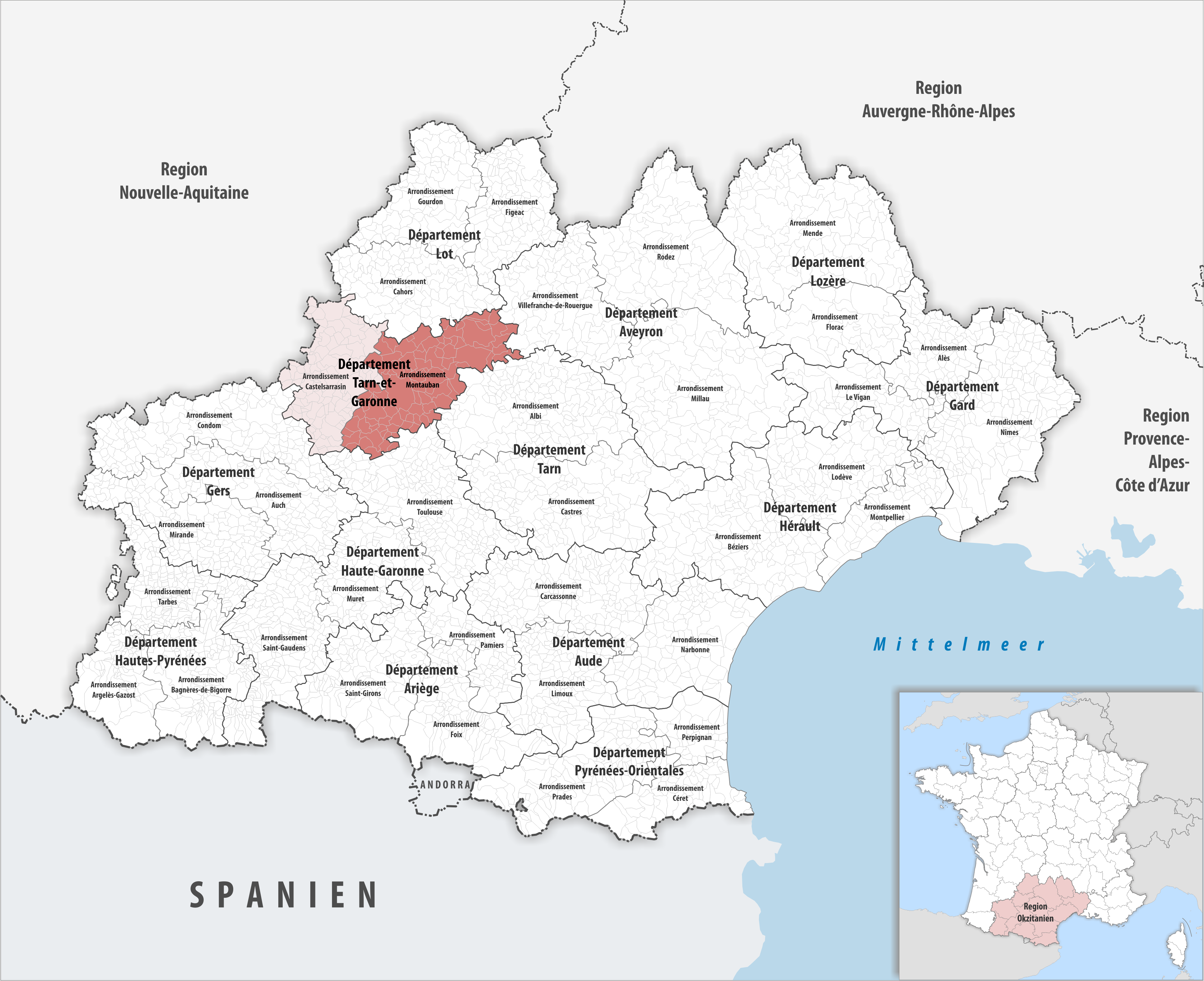 Lage des Arrondissements Montauban